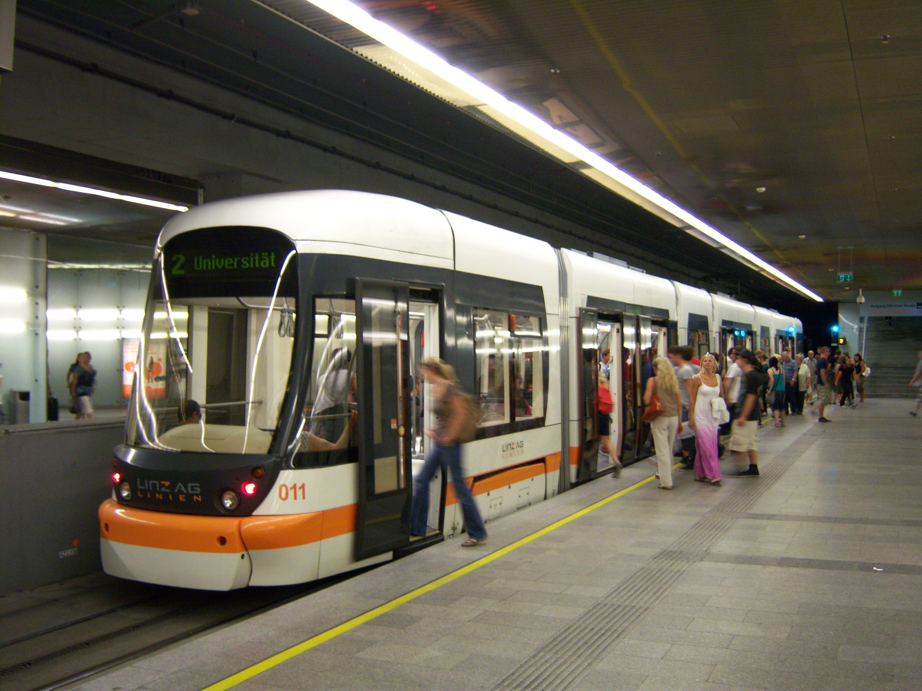 Haltestelle am Hauptbahnhof der Linzer Unterpflasterstraßenbahn